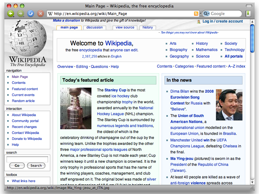 Una screenshot del navegador Camino para MAC OS X